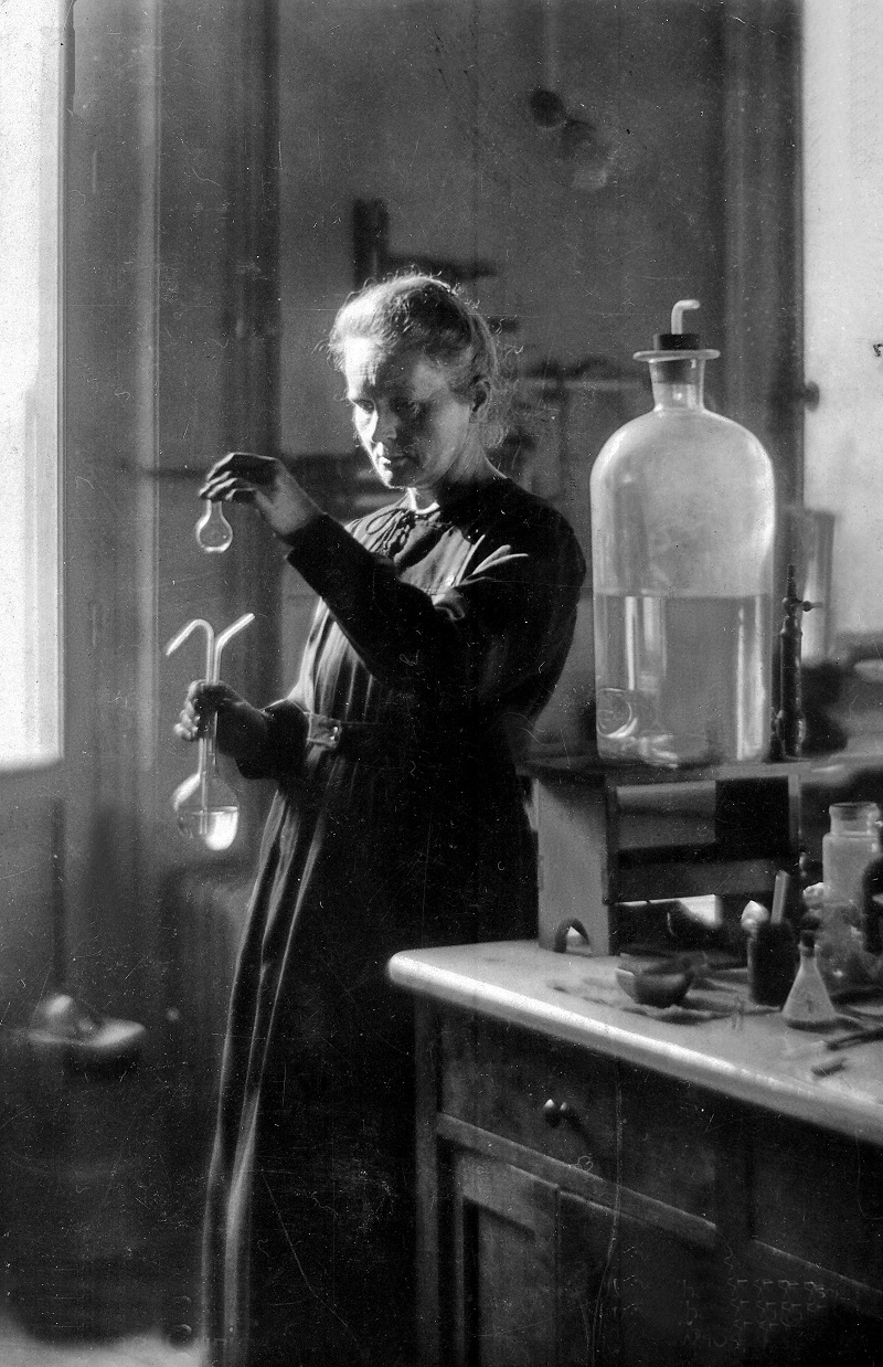 Marie Curie. En esta foto la podemos ver ahí por 1925 trabajando duro en su laboratorio en la Universidad de París.